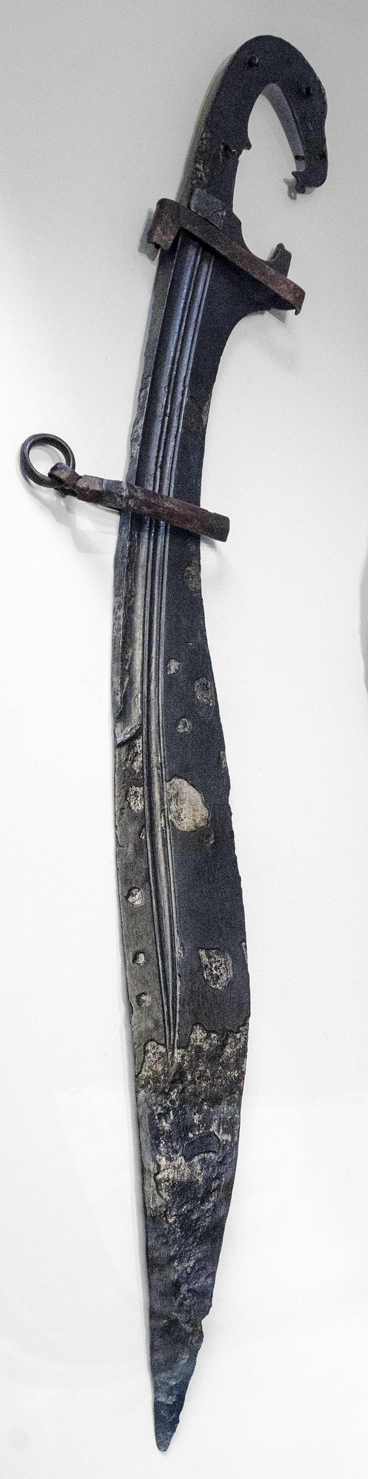 La falcata es un arma característica de los pueblos ibéricos. Ésta, de unos 60 cm de longitud, está forjada en hierro y datada entre finales del siglo V a.C. y princiios del III a.C. Se encontró en la necrópolis de Los Collados, Córdoba.